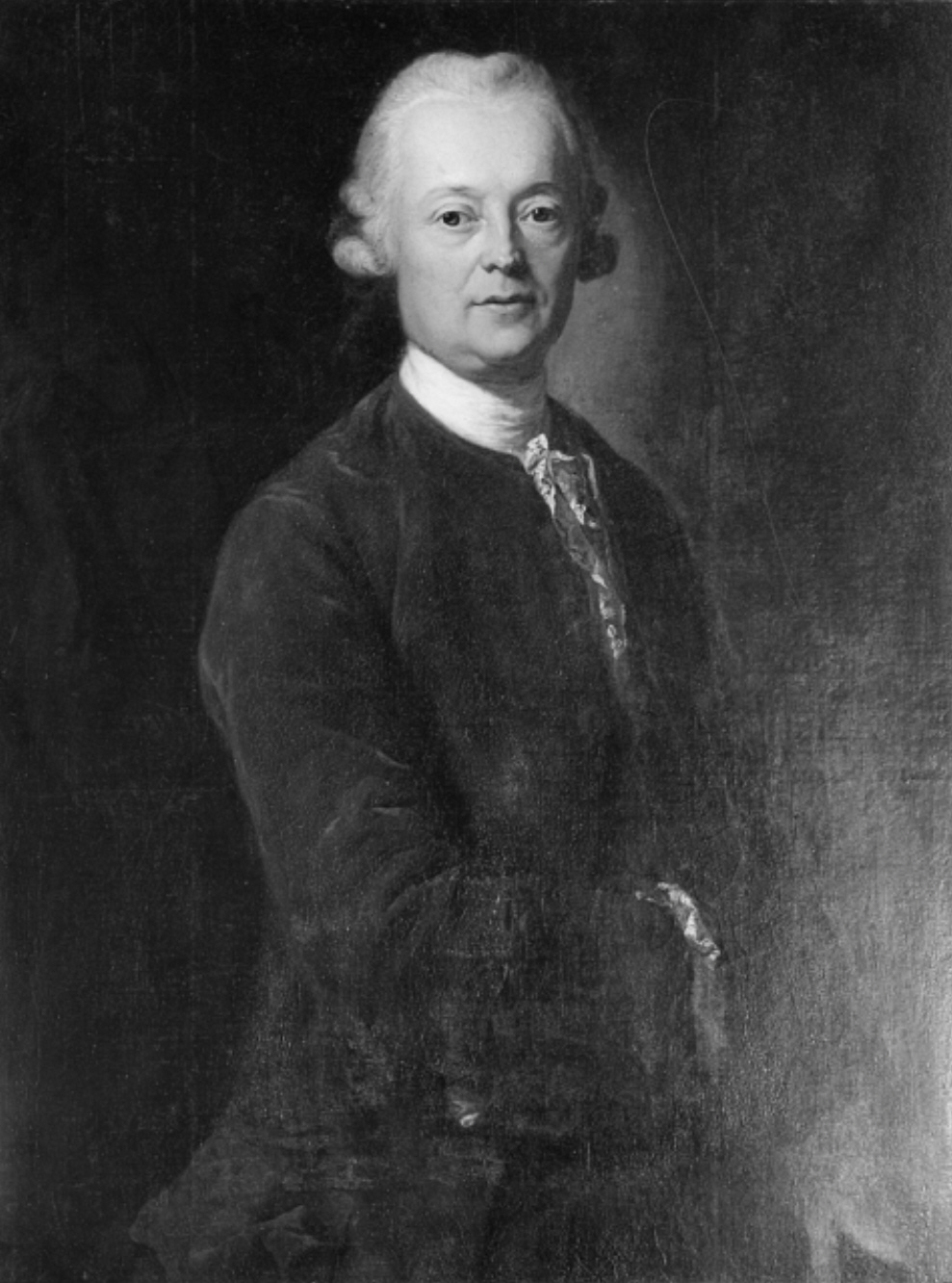 Count Johann Georg von Einsiedel (1730-1811), Saxon statesman